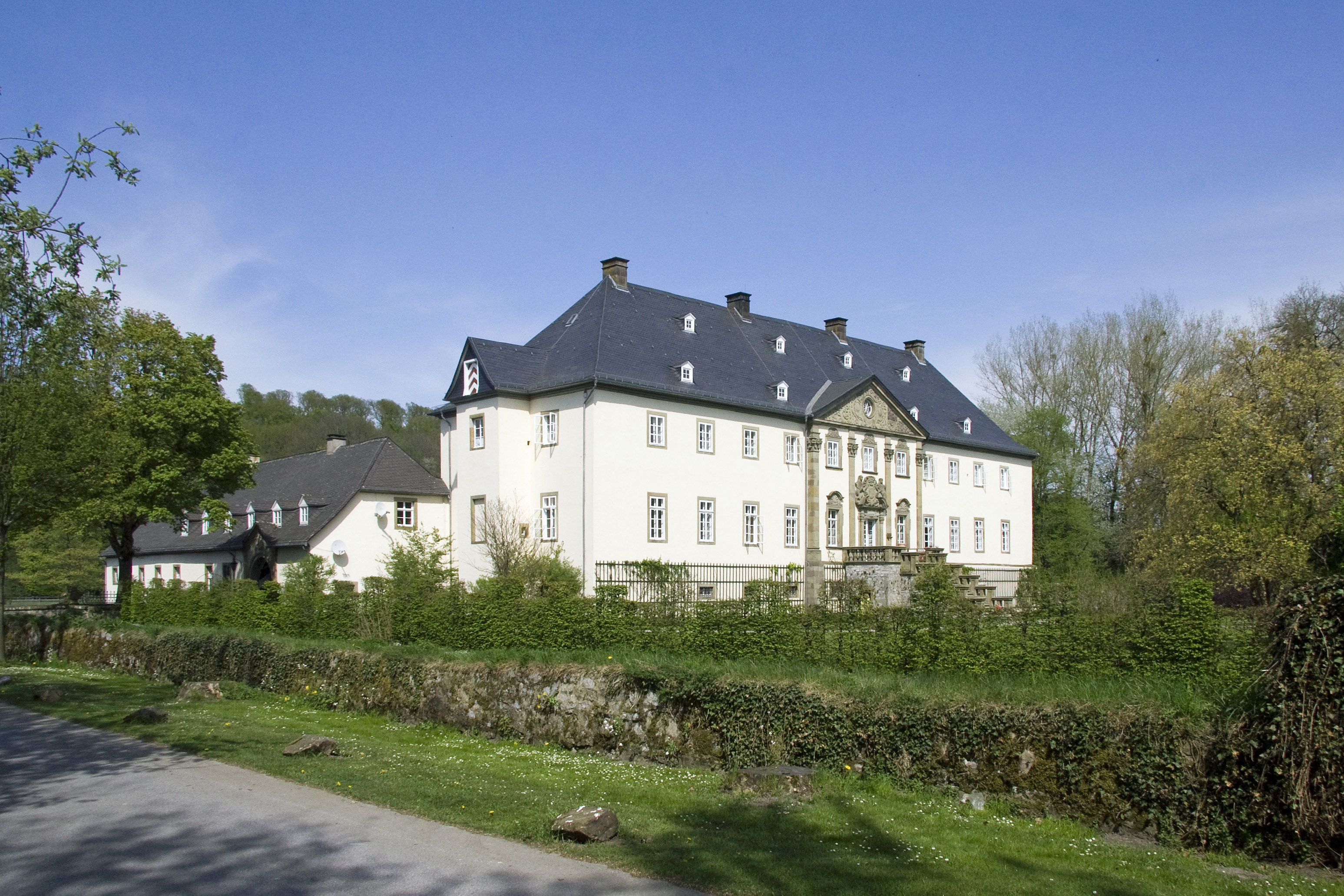 Gesamtansicht des Schlosses Alme